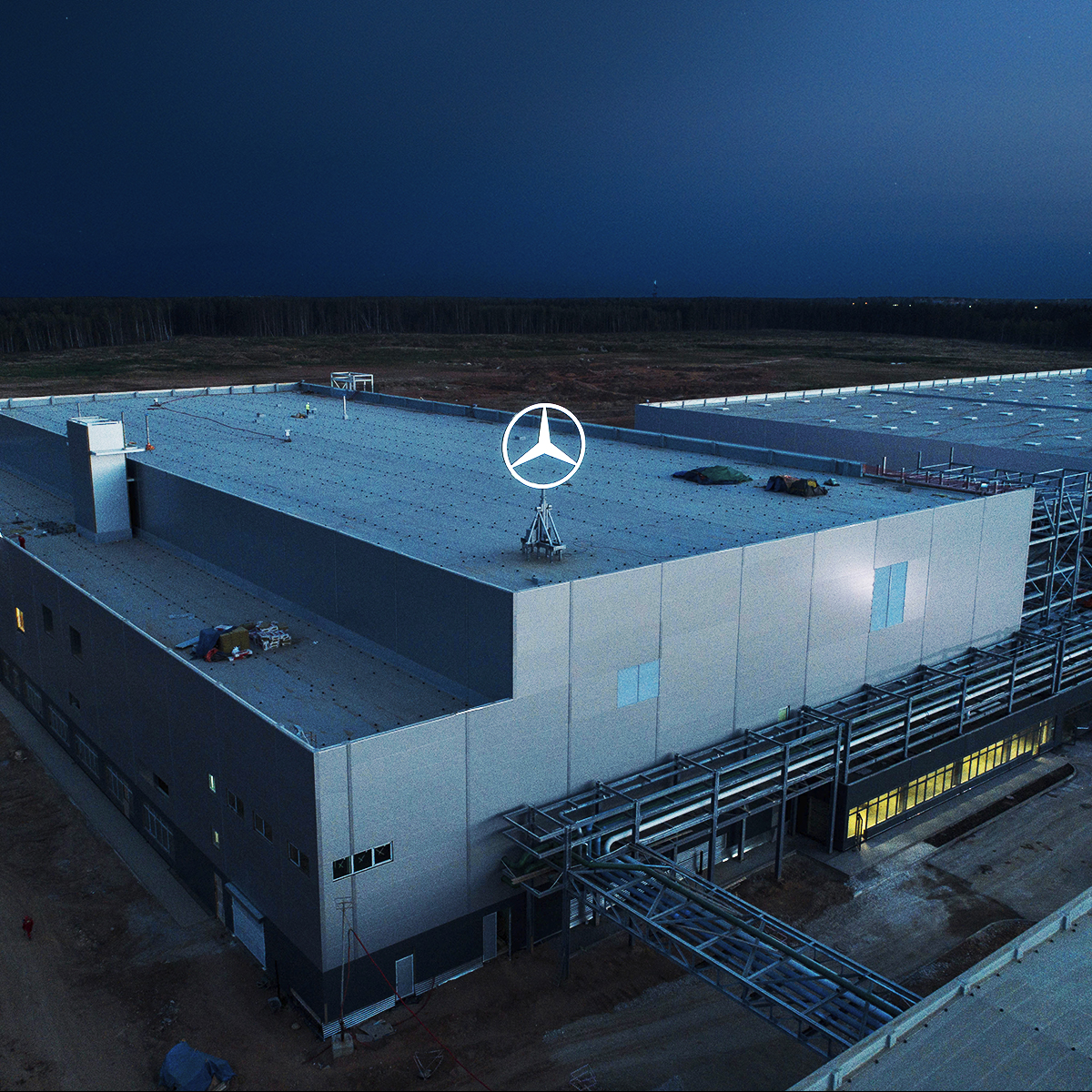 Фото завода после завершения строительства